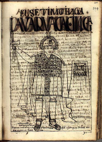 Illustration from the book El primer nueva corónica y buen gobierno